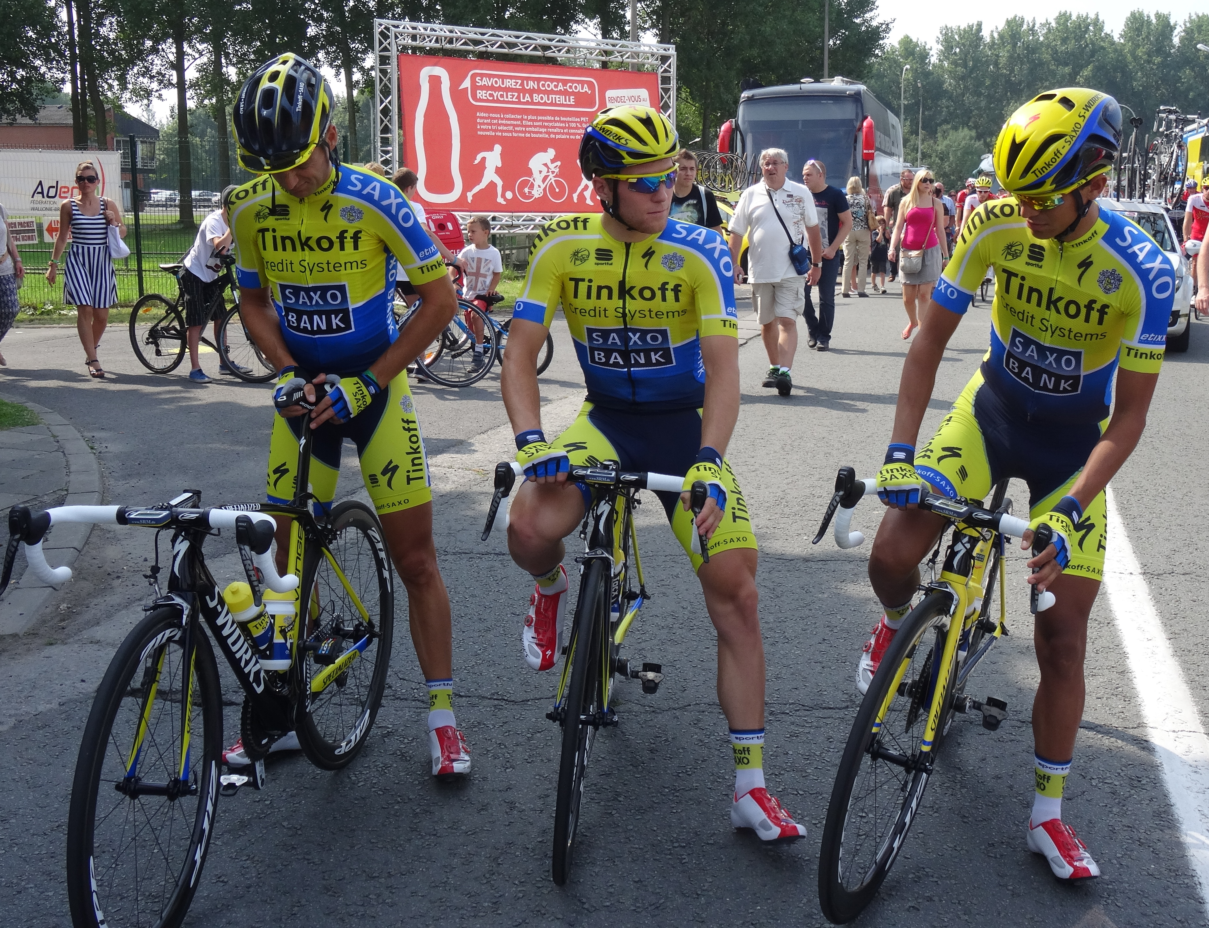 Reportage photographique réalisé le dimanche 27 juillet à l'occasion du départ de la deuxième étape du Tour de Wallonie 2014 à Péronnes-lez-Antoing (Antoing), Belgique.